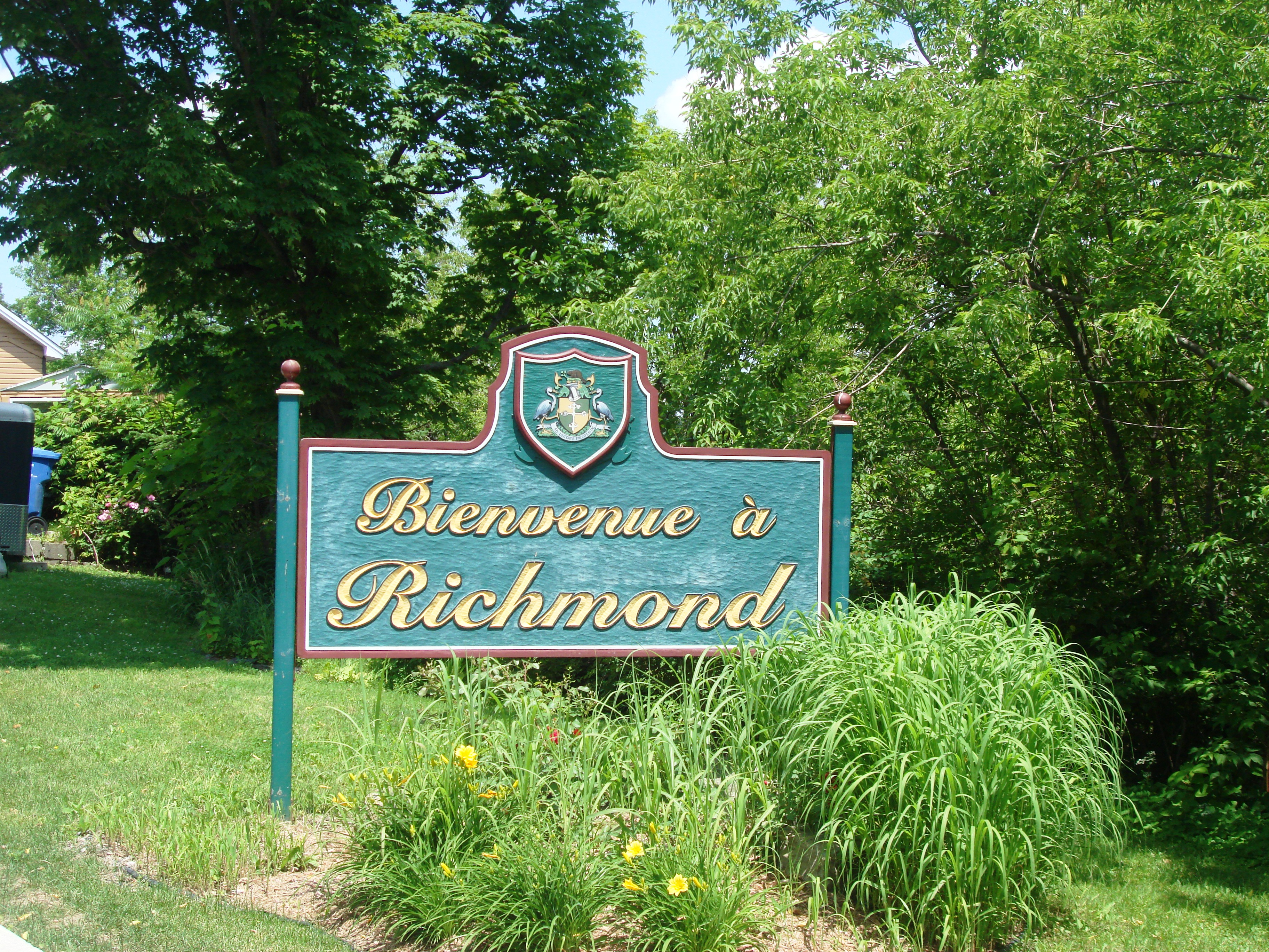 Bienvenue à Richmond